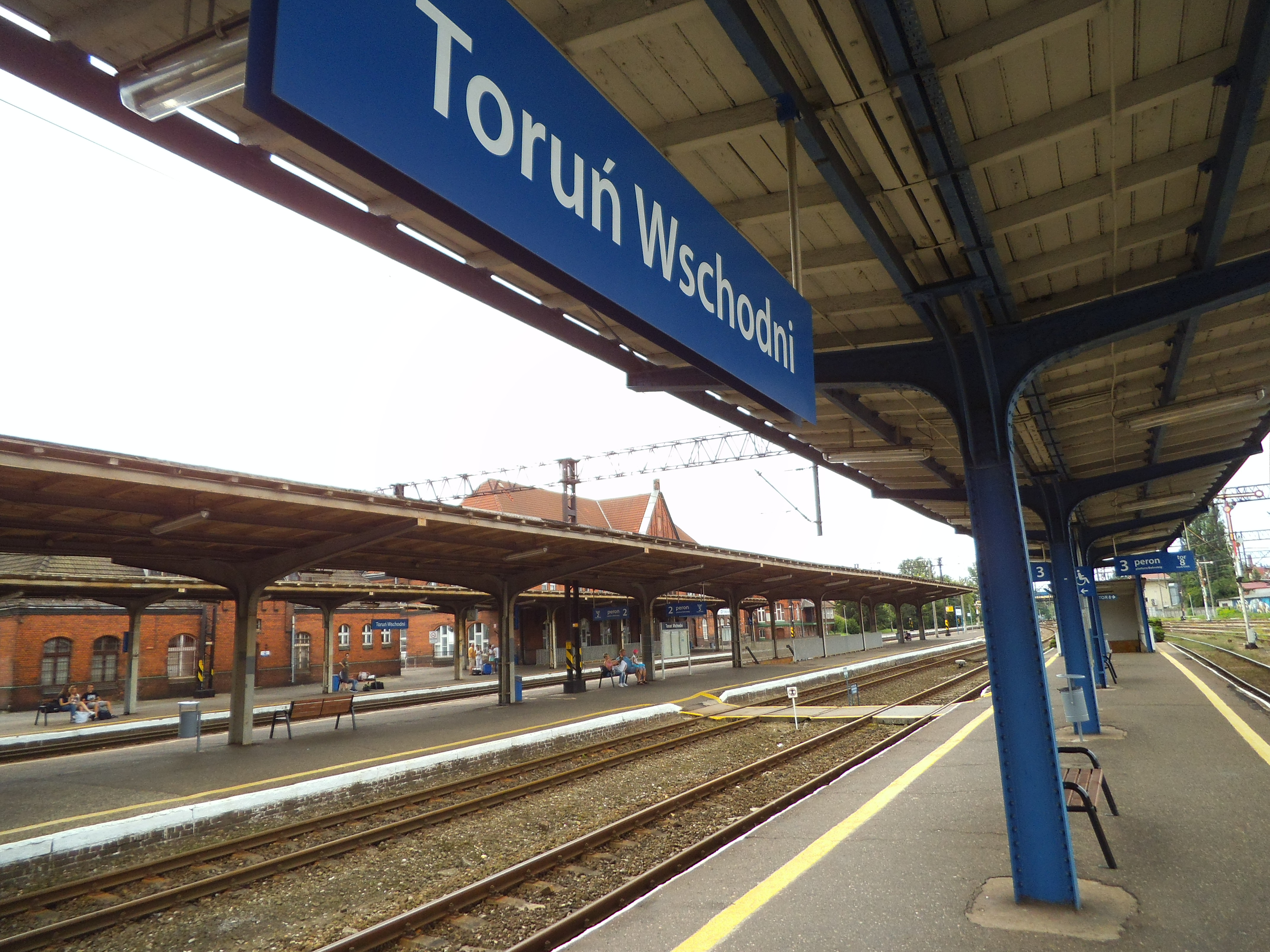 Toruń Wschodni3